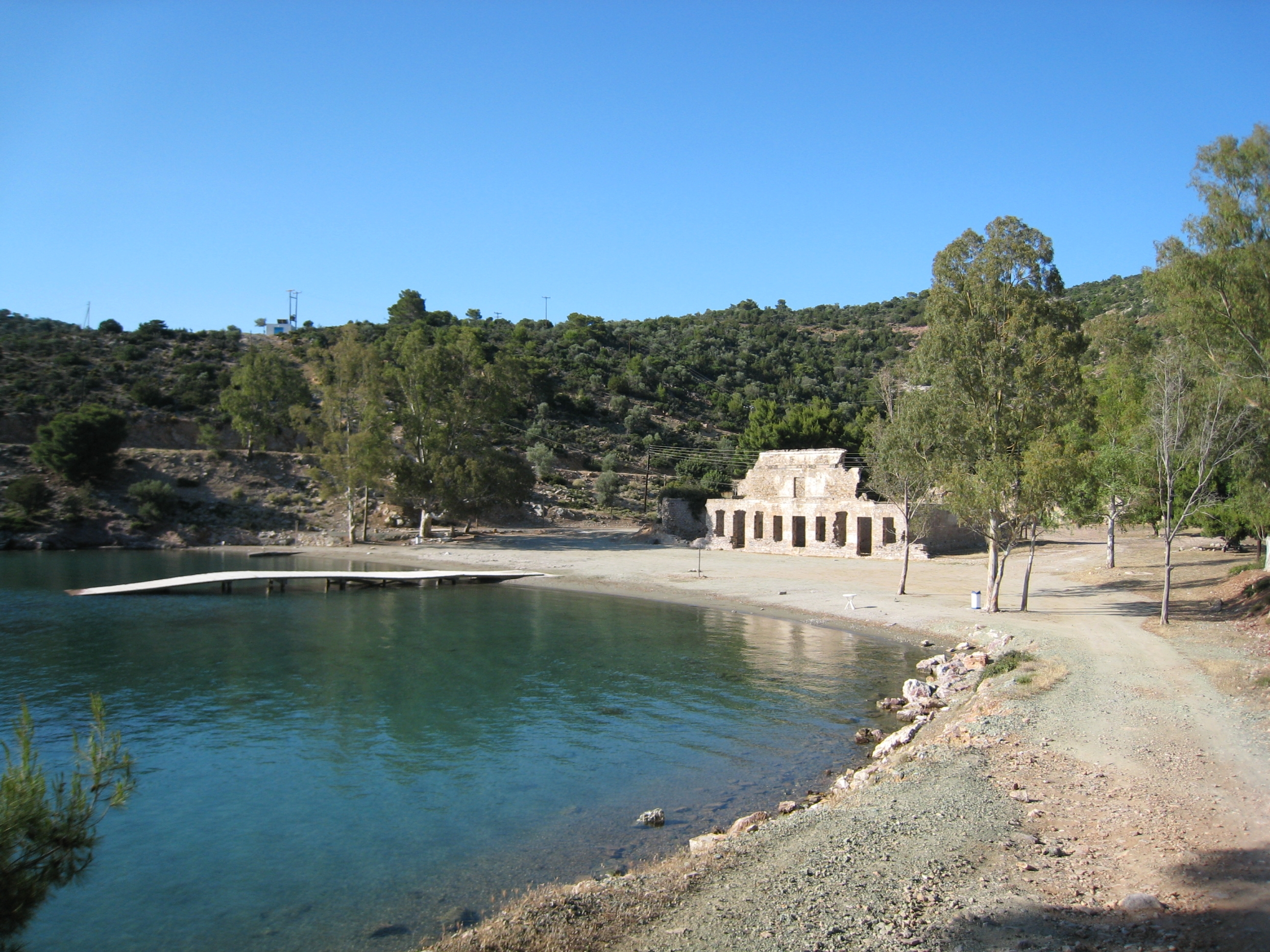 Poros